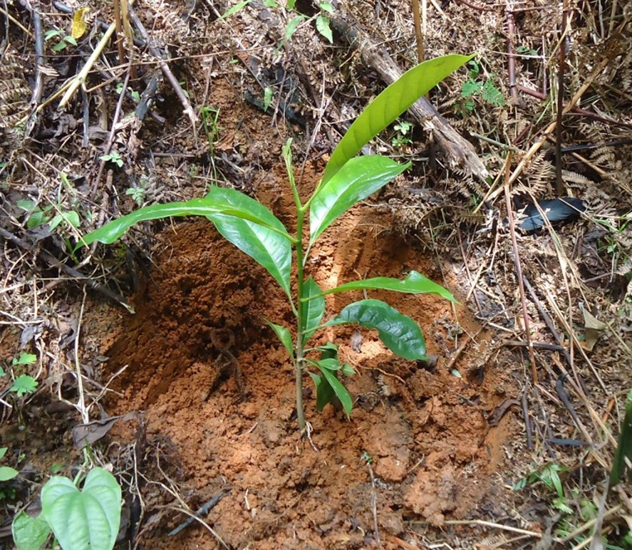 muda de Magnolia silvioi já plantada